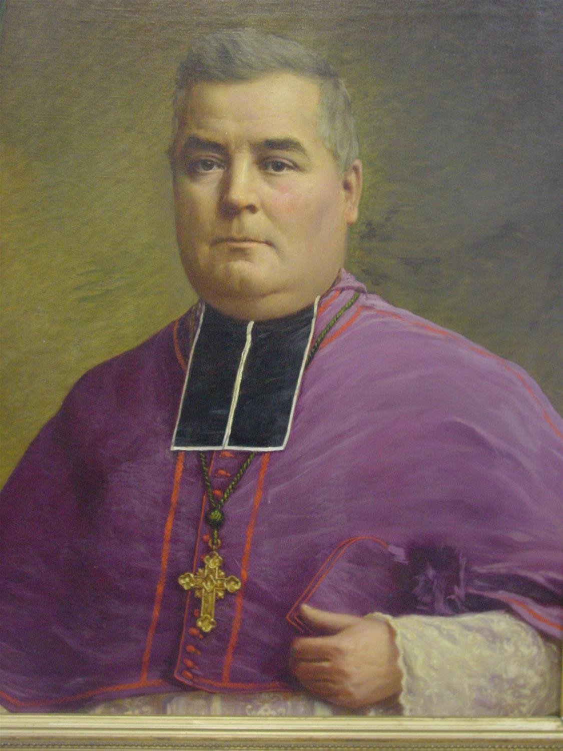 Portrait de Mgr François-Virgile Dubillard, évêque de Quimper et de Léon de 1900 à 1908